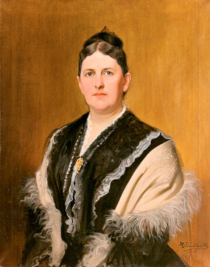 Portrait vun der Thérèse Glaesener-Hartmann.